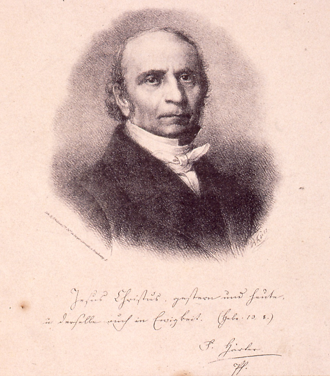 François-Henri Haerter (ou Franz Heinrich Härter en allemand), né à Strasbourg le 17 avril 1797 et mort dans la même ville le 5 août 1874, est un pasteur luthérien, fondateur d'œuvres, notamment des Diaconesses de Strasbourg. Il joua un rôle de premier plan dans le réveil du piétisme en Alsace